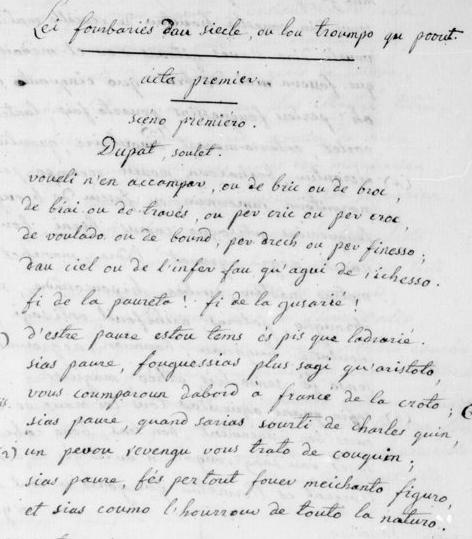 manuscrit sur